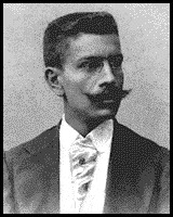 Coelho Neto (1864-1934), brazila verkisto.